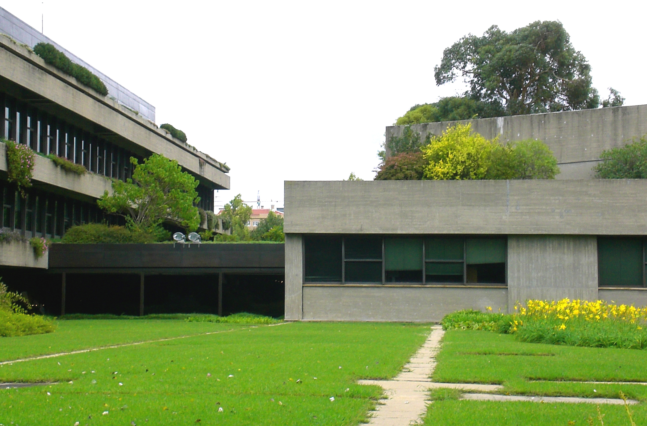 Fundação Calouste Gulbenkian - Lisboa - Coberturas verdes 10.2006 Doris Correia